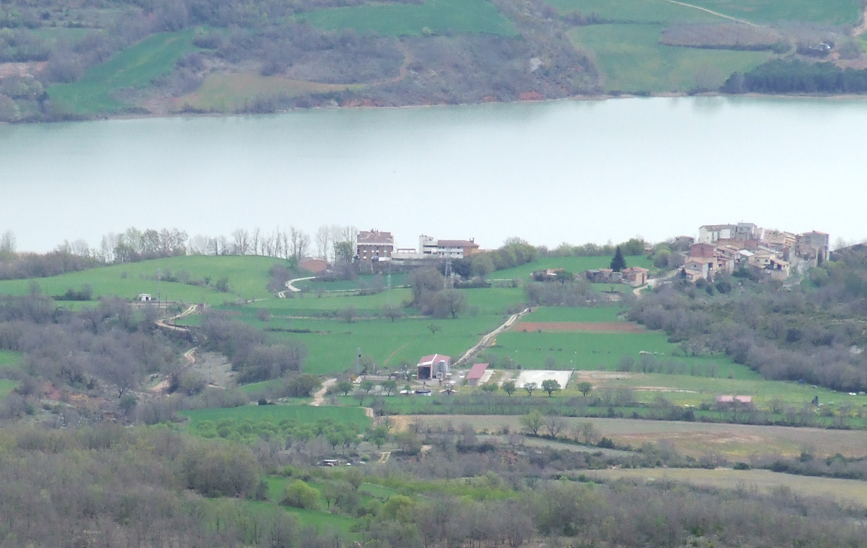 Vista general del poble de Cellers des de la carretera de Moror (Guàrdia de Tremp, Castell de Mur, Pallars Jussà)